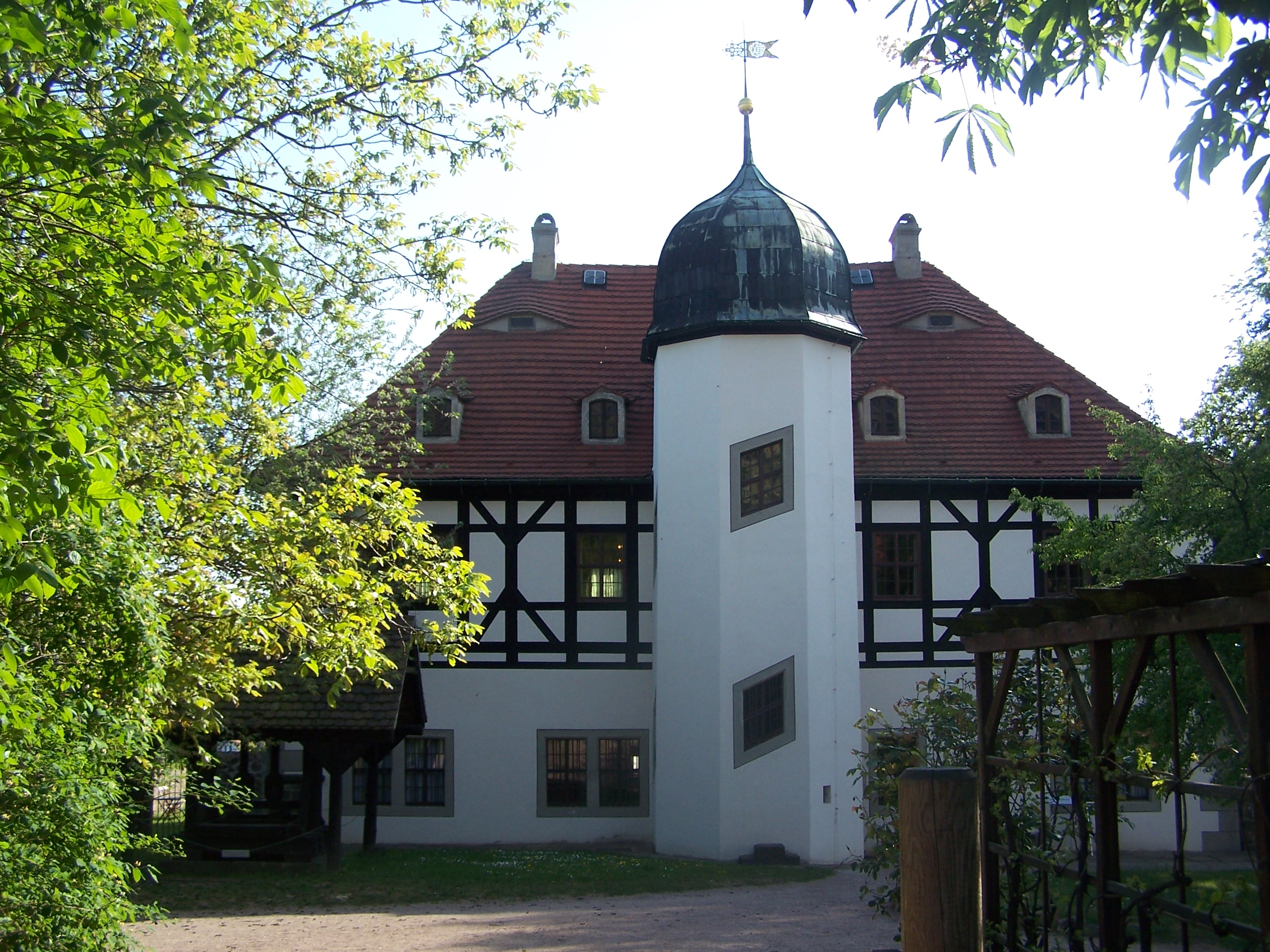 Weingut Hoflößnitz in Radebeul / vineyard Hoflößnitz in Radebeul